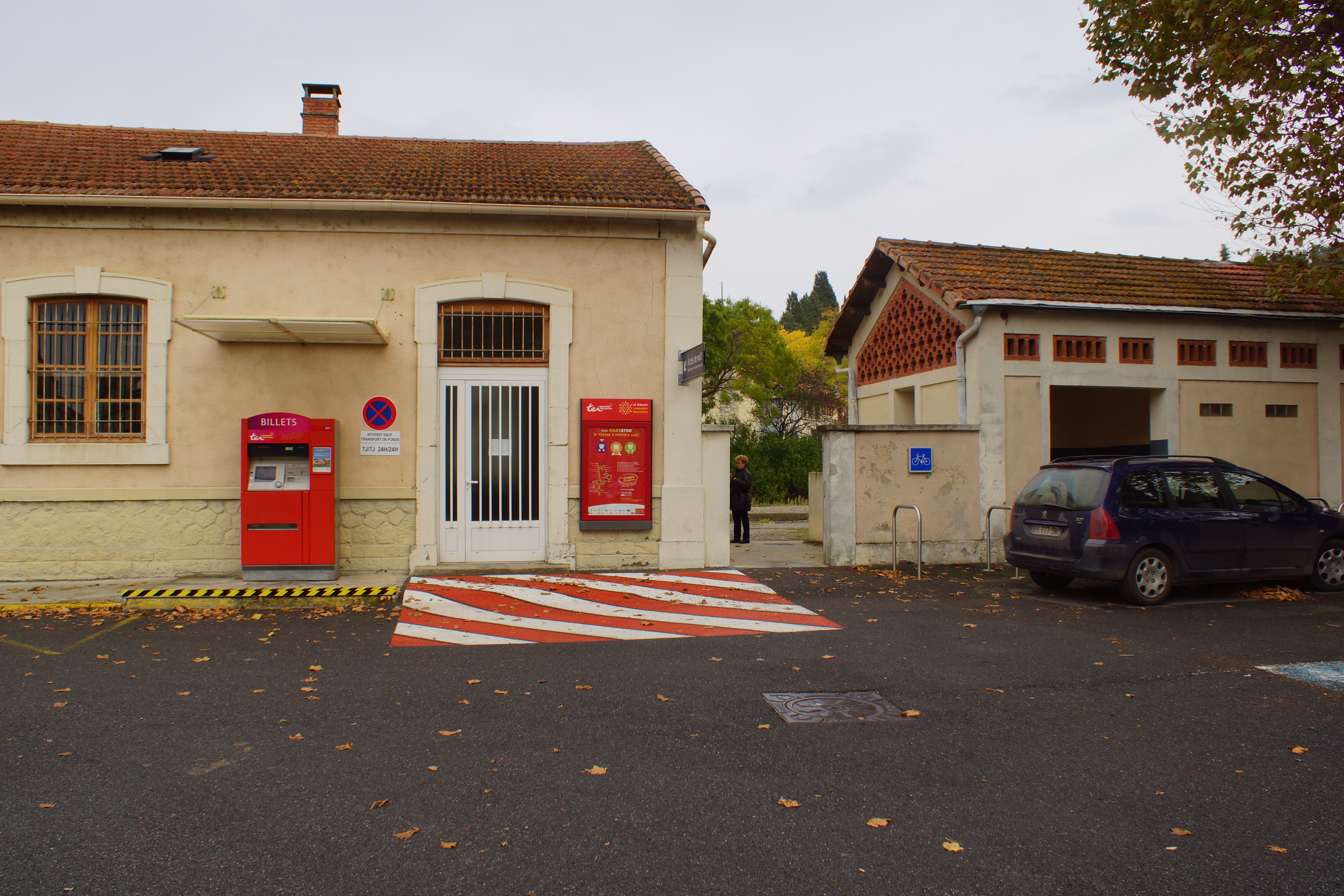 Gare de Limoux : automates billets TER et accès aux quais quand le bâtiment est fermé.